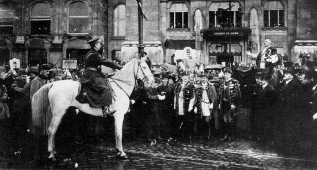 Horthy Miklós a Nemzeti Hadsereg élén bevonul Budapestre - Gellért Szálló, 1919.11.16